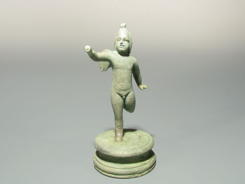 Statuette d'Eros en bronze, découverte à Reichshoffen en 1974, fabriquée à partir d'un moulage à la cire perdue. Exposée au Musée Historique et Industriel - Musée du Fer de Reichshoffen.